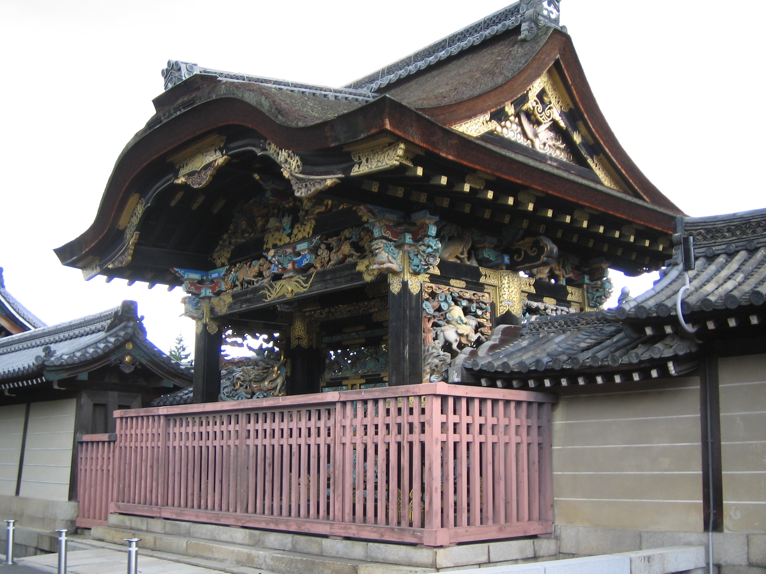 Kara Mon (唐門) of Nishi Hongwanji in Kyoto, Japan.